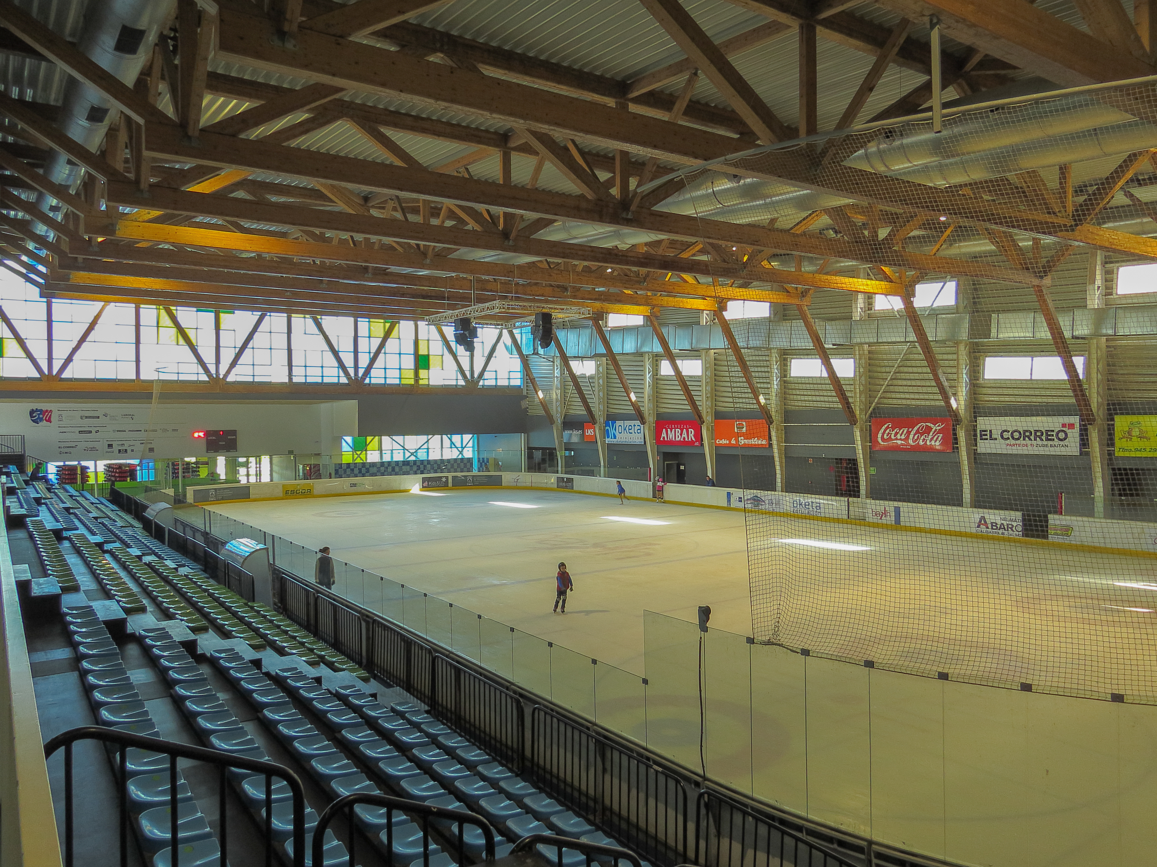 Pista de hielo en el centro deportivo BAKH, Salburua, Vitoria-Gasteiz, Álava, País Vasco, España